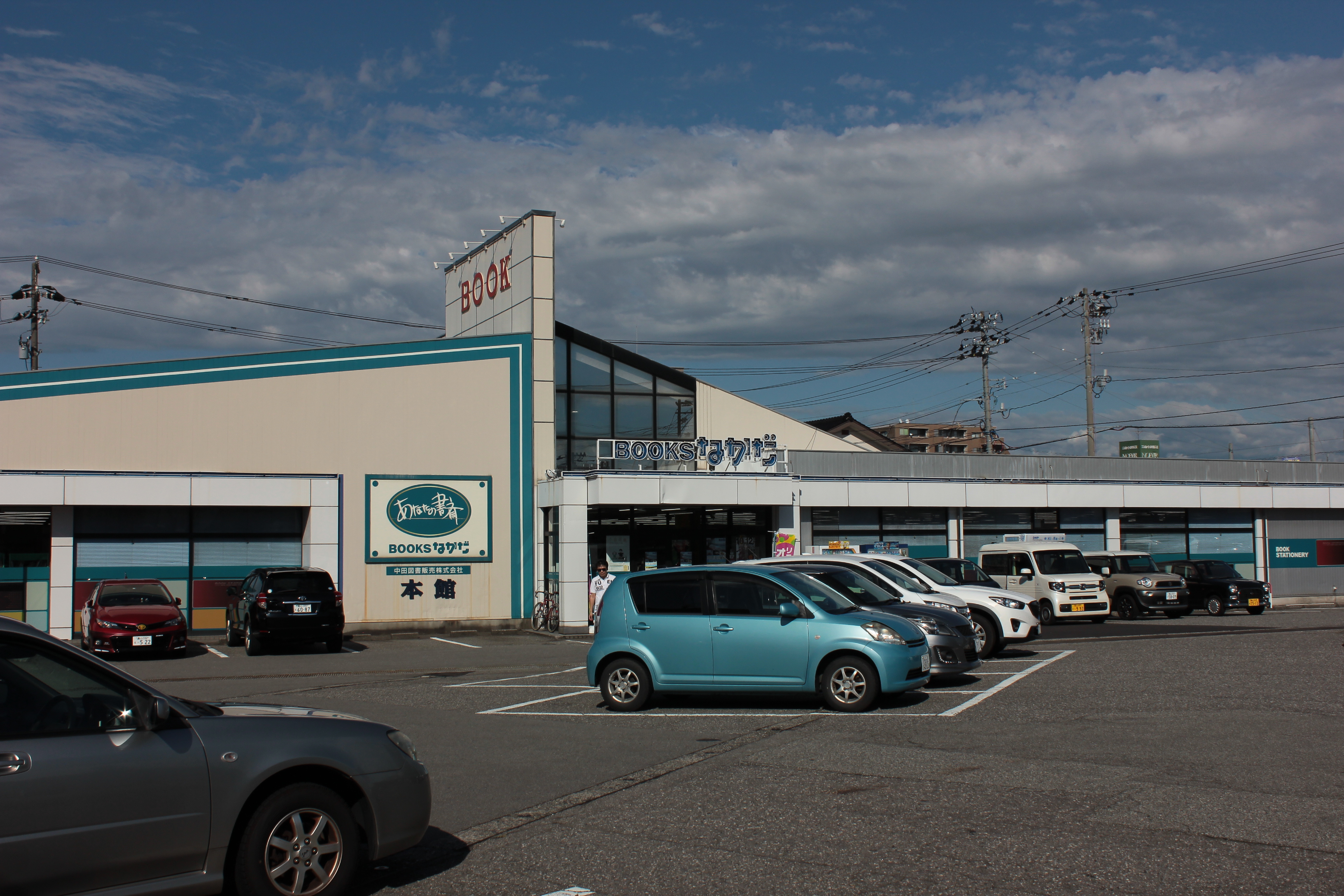 Booksなかだ掛尾本店（富山県富山市） Canon EOS Kiss X5